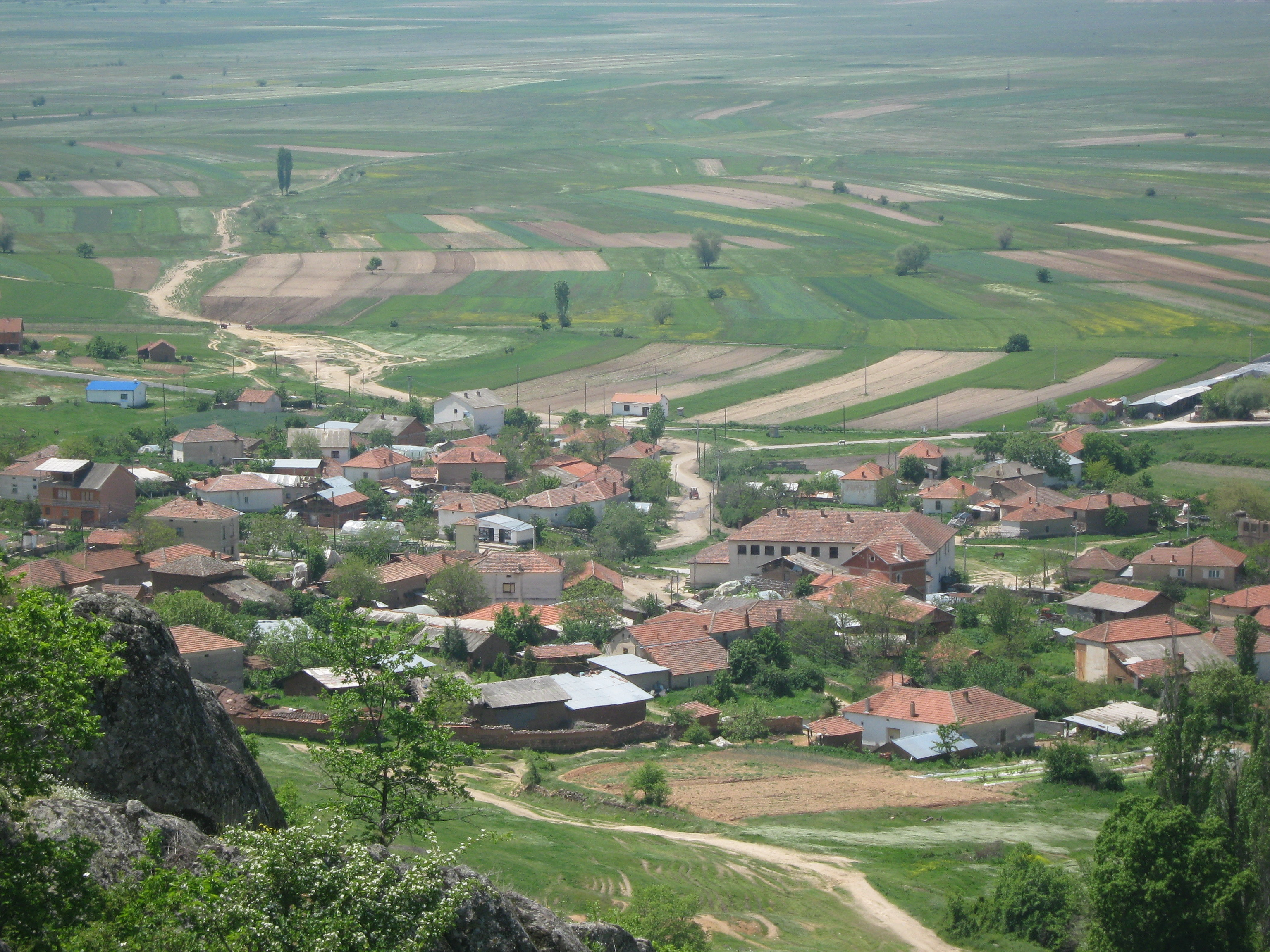 Mažučište